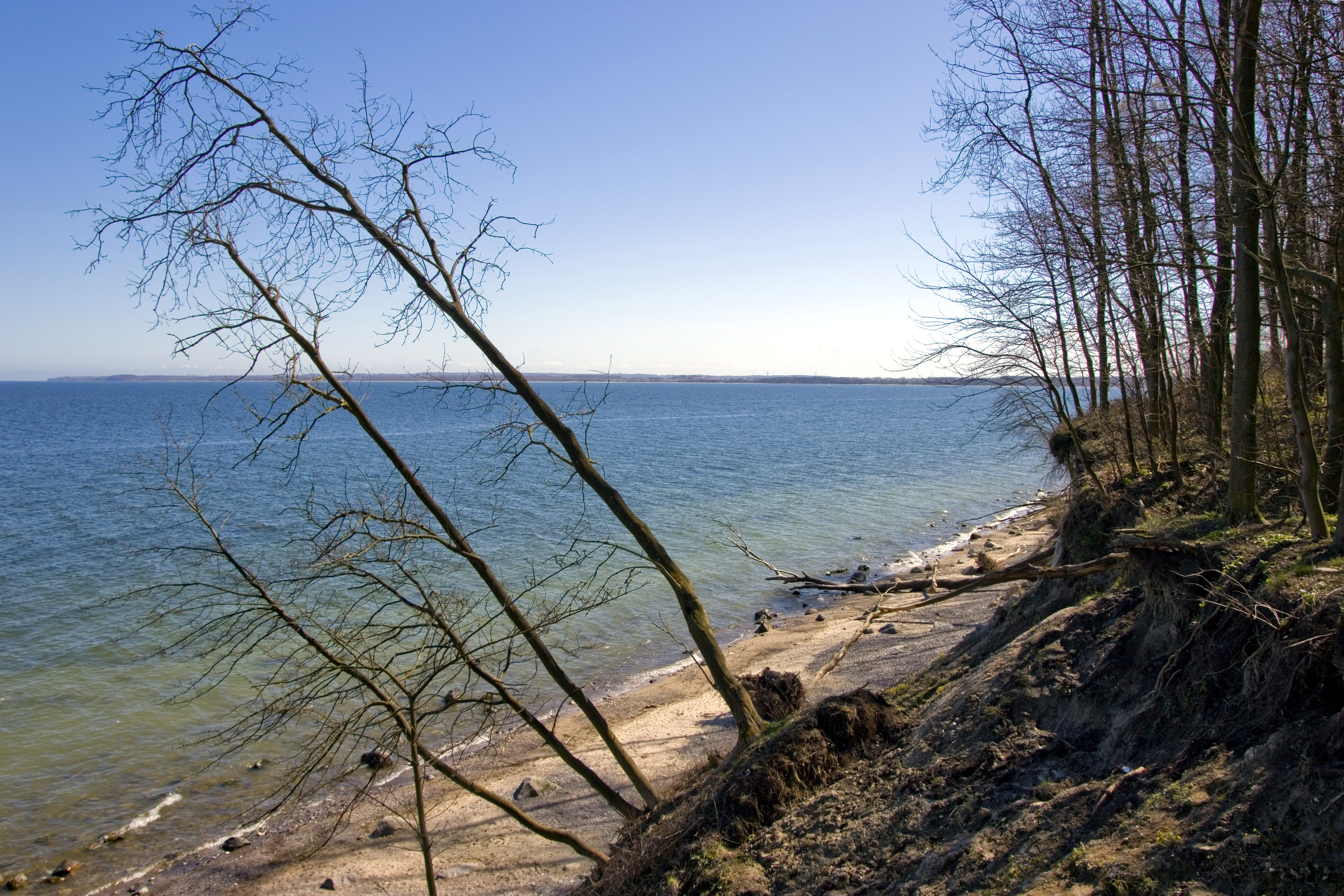 Blick auf den Strand und die Ostsee unterhalb des Brodtener Ufers